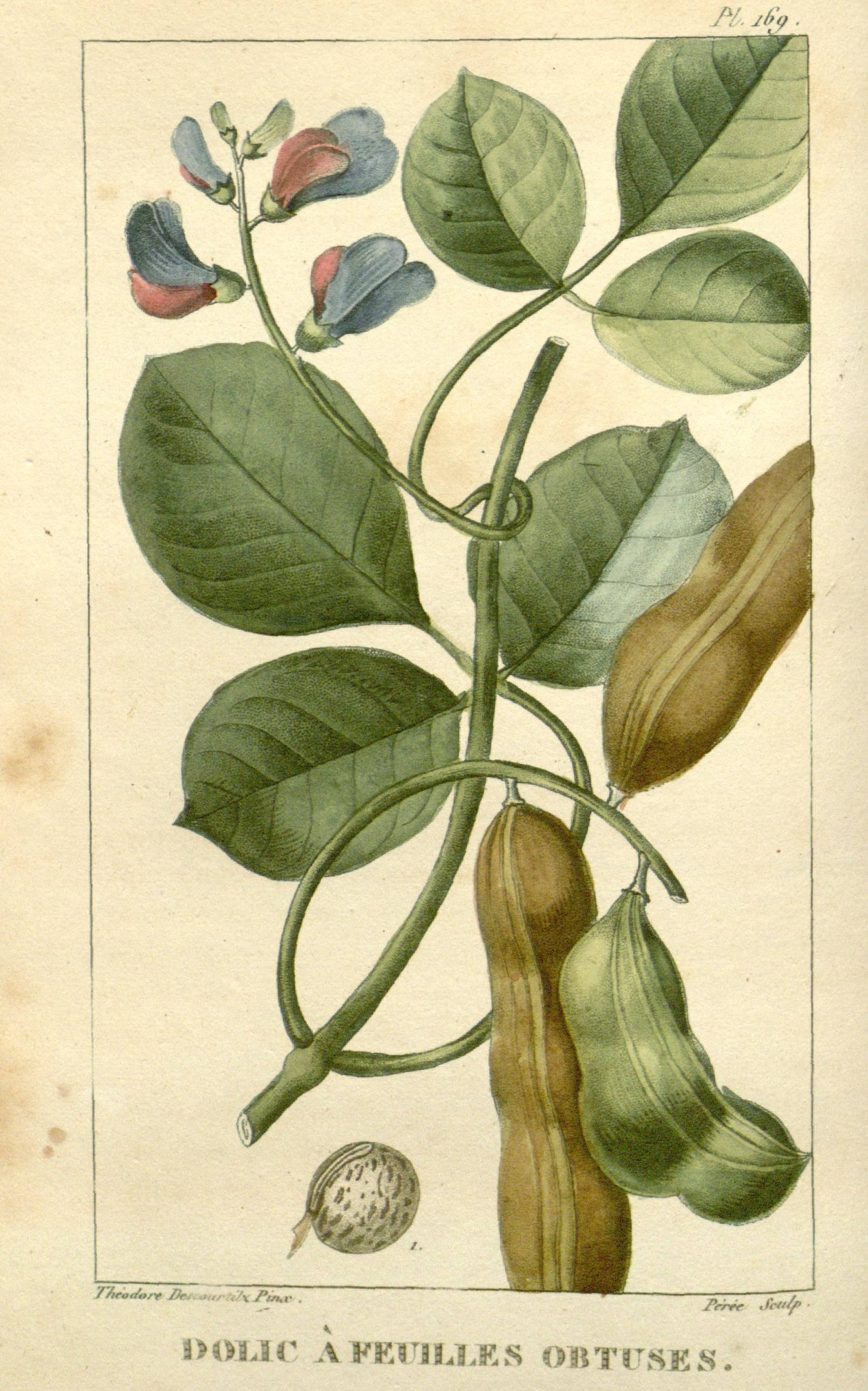 'r/.r«,/,„r flr . , \ j"in.. l'rrrr Sc«/f